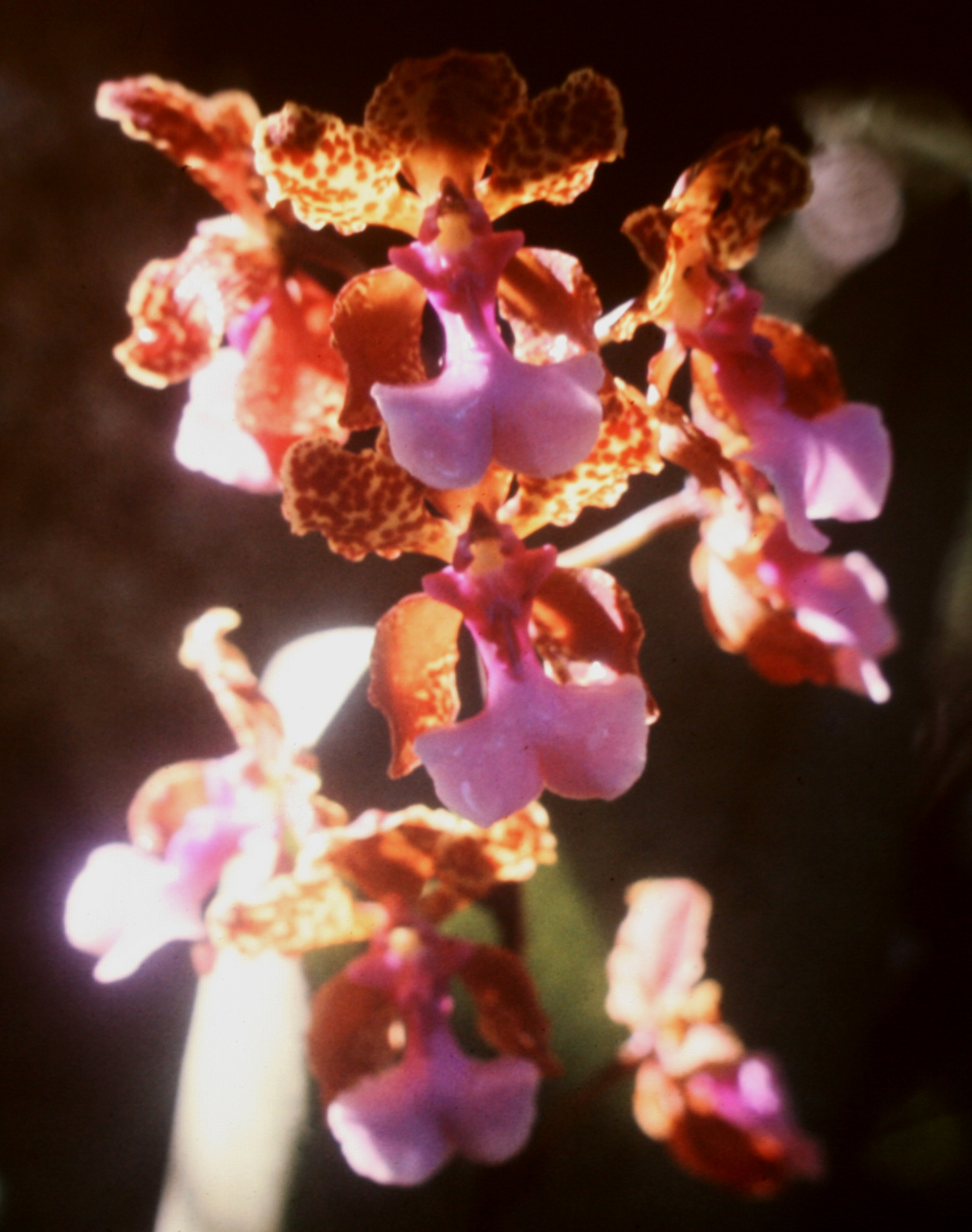 Oncidium lanceanum, Suriname.